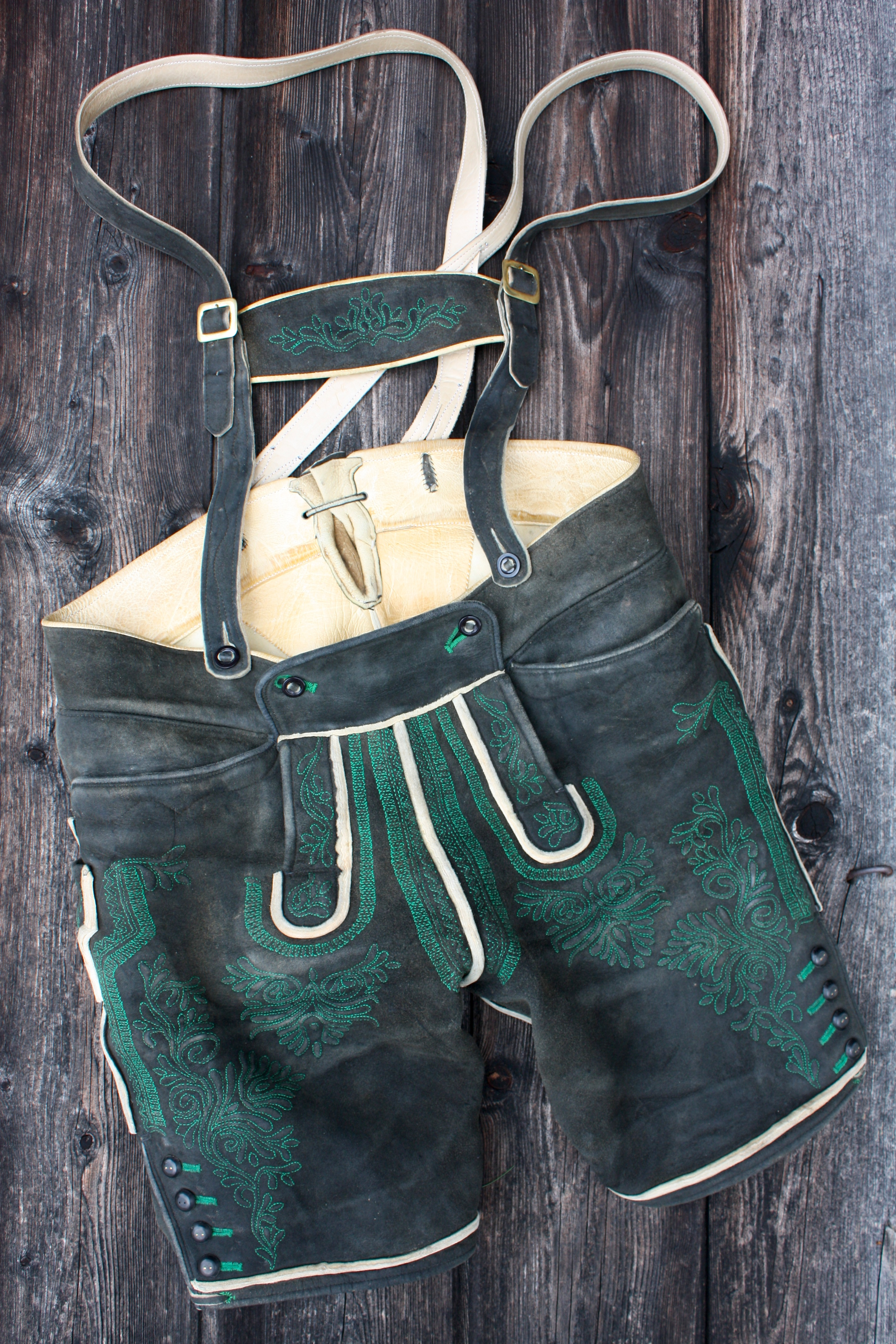 Traditionelle Altausseer Lederhose vom Lederhosenmacher Raich Bad Aussee, Maßanfertigung aus dem Jahr 2007